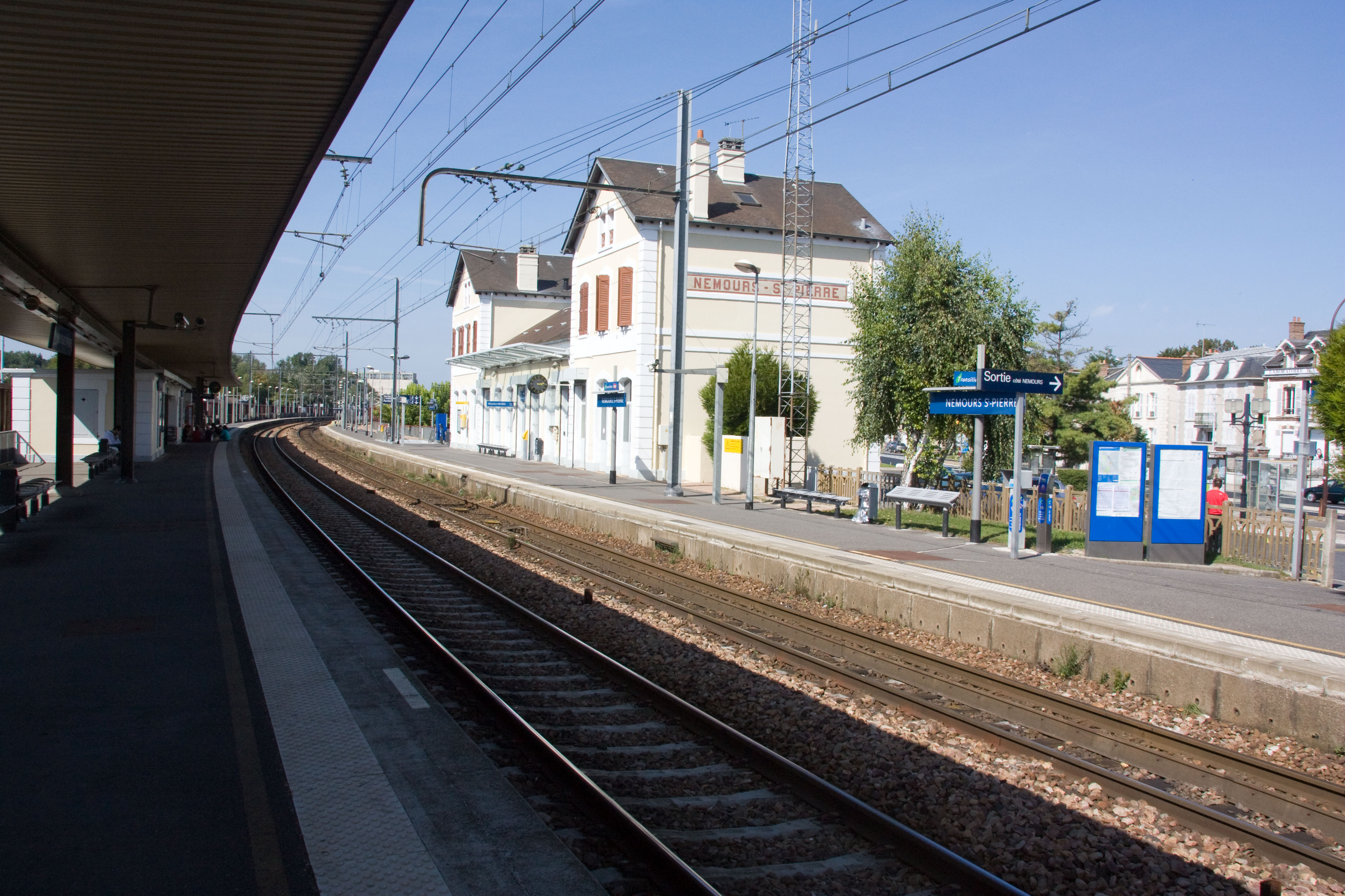 Gare de Nemours - Saint-Pierre. Saint-Pierre-lès-Nemours, Seine-et-Marne, France.